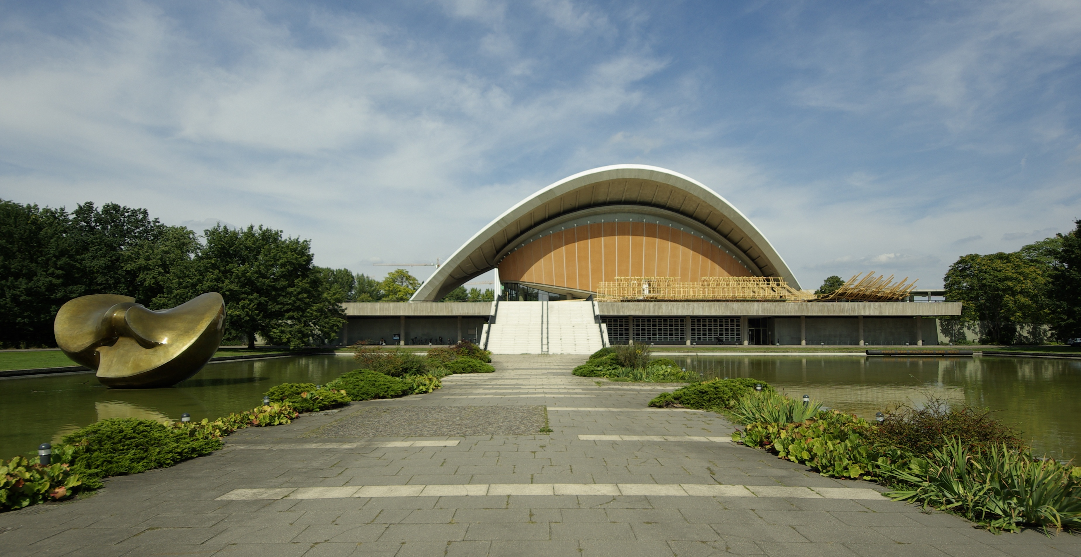 Kongresshalle in Berlin